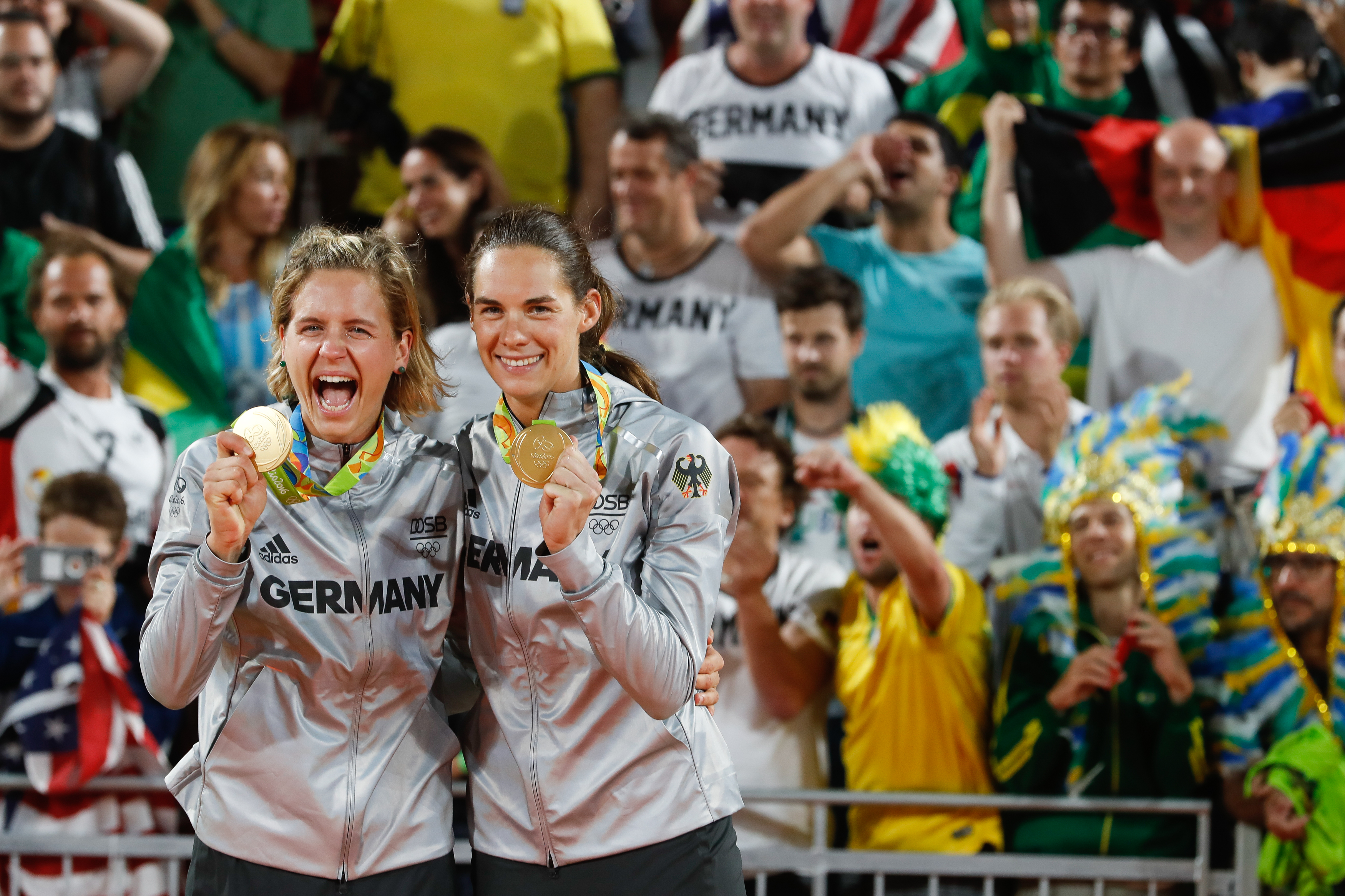 Rio de Janeiro - As alemãs Ludwig e Walkenhorst, levam ouro na final do vôlei de praia, contra as brasileiras, Ágatha e Bárbara, nos Jogos Olímpicos Rio 2016 ( Fernando Frazão/Agência Brasil)